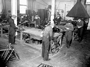 Kone ja Terä Oy:n konepajassa